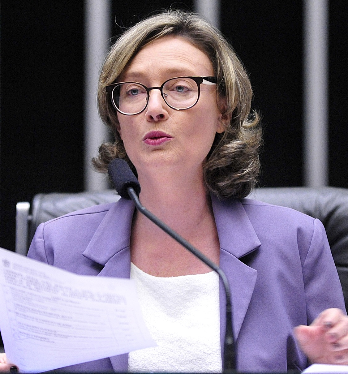 Maria do Rosário em setembro de 2016.